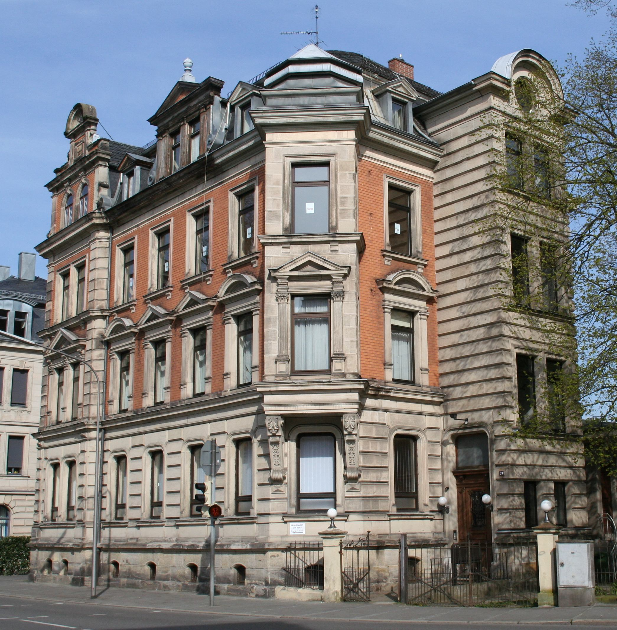 Löwenstraße 29 in Coburg